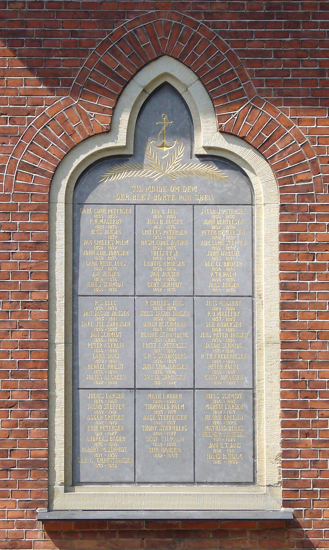 Dragør Kirke, Copenhagen, Denmark. Memorial for sailors lost at sea.